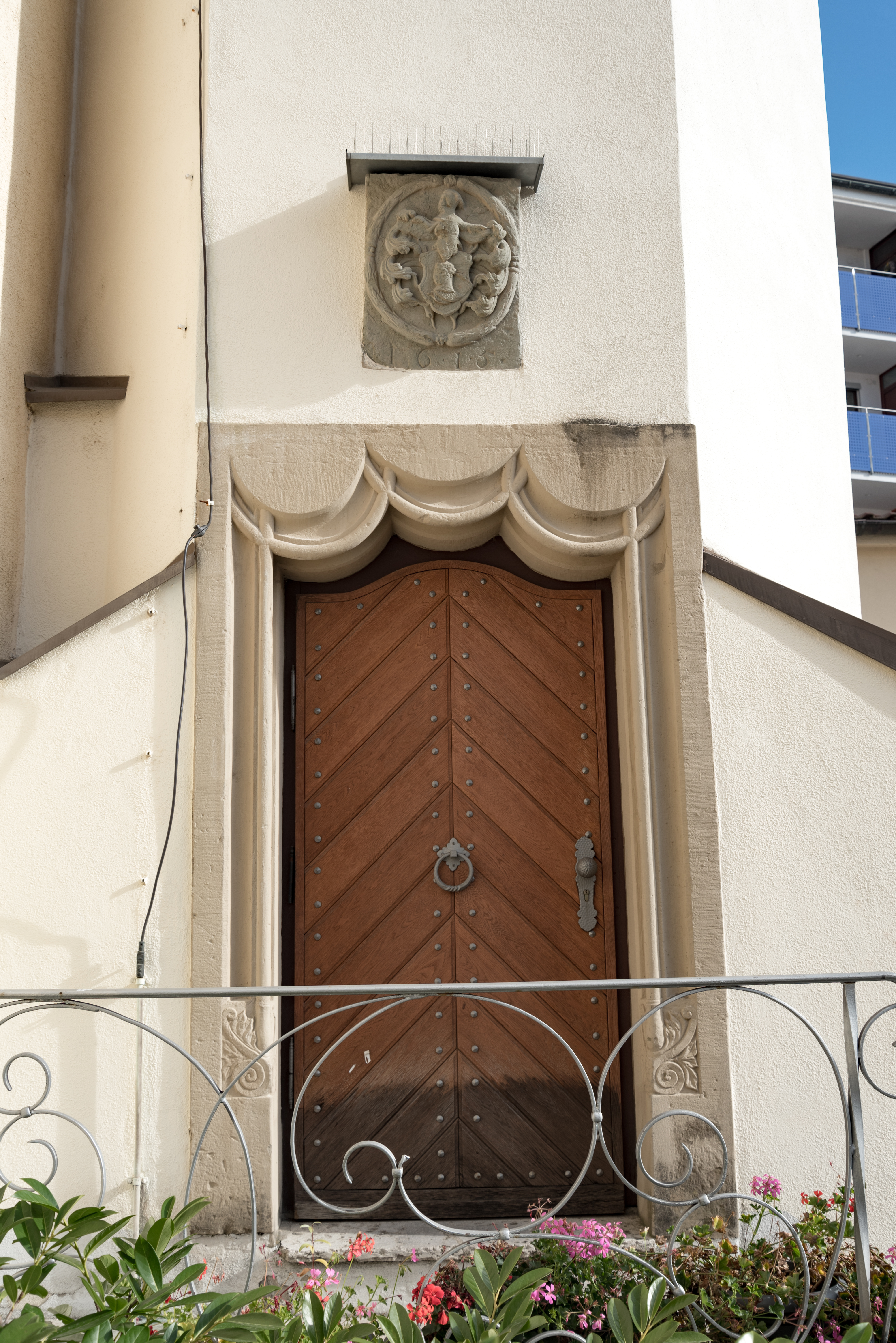 Schweinfurt, Roßmarkt 3